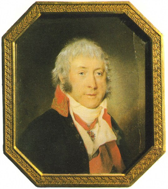 Петр Васильевич Мятлев (13.12.1756-15.02.1833)